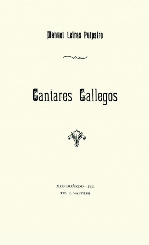 Manuel Leiras Pulpeiro, Cantares Gallegos, Mondoñedo, 1911